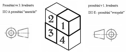 Obrázek 2. Rozdělení prostoru na kvadranty.